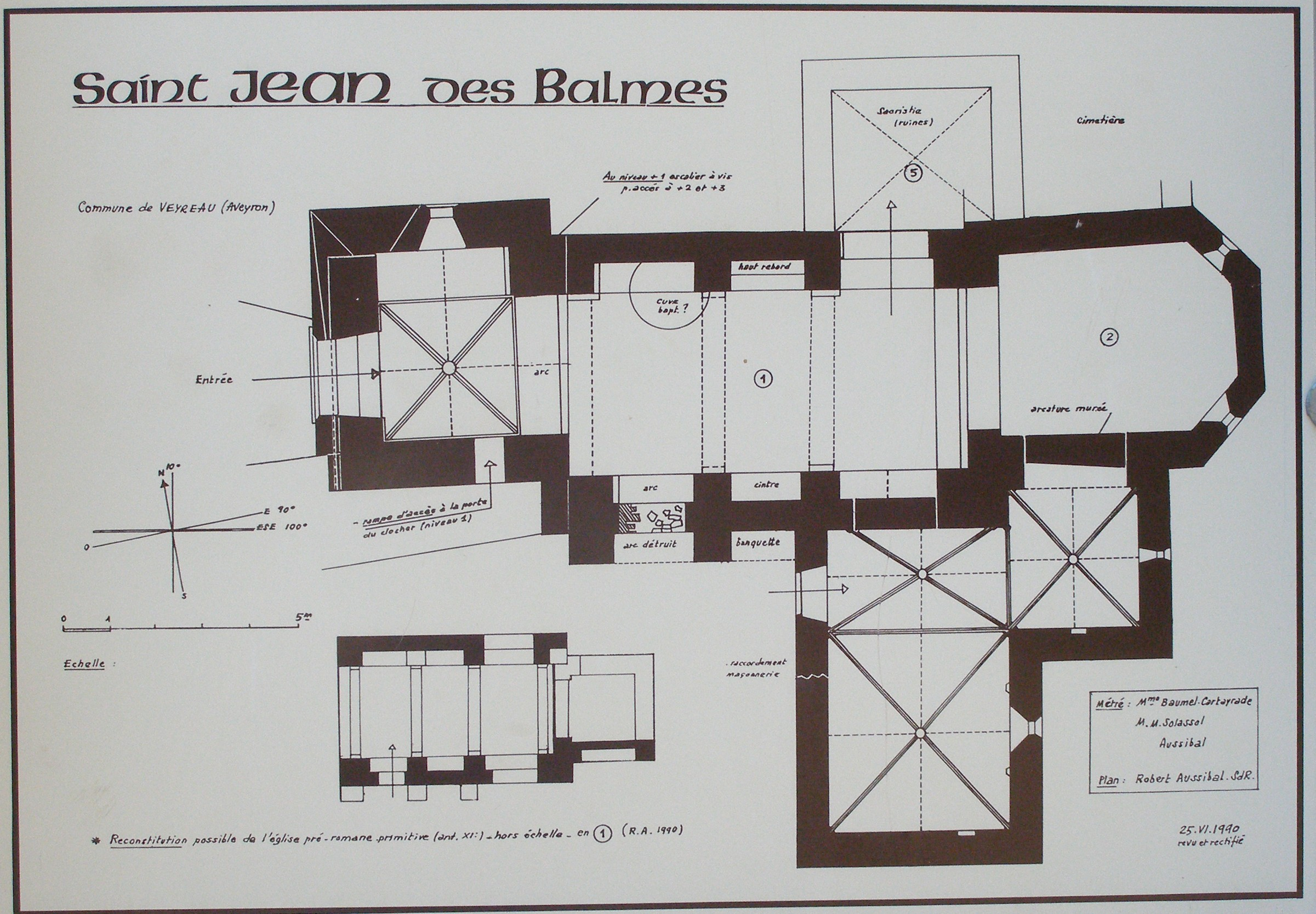 Photographie du plan du monument qui est affiché à l'entrée du clocher.